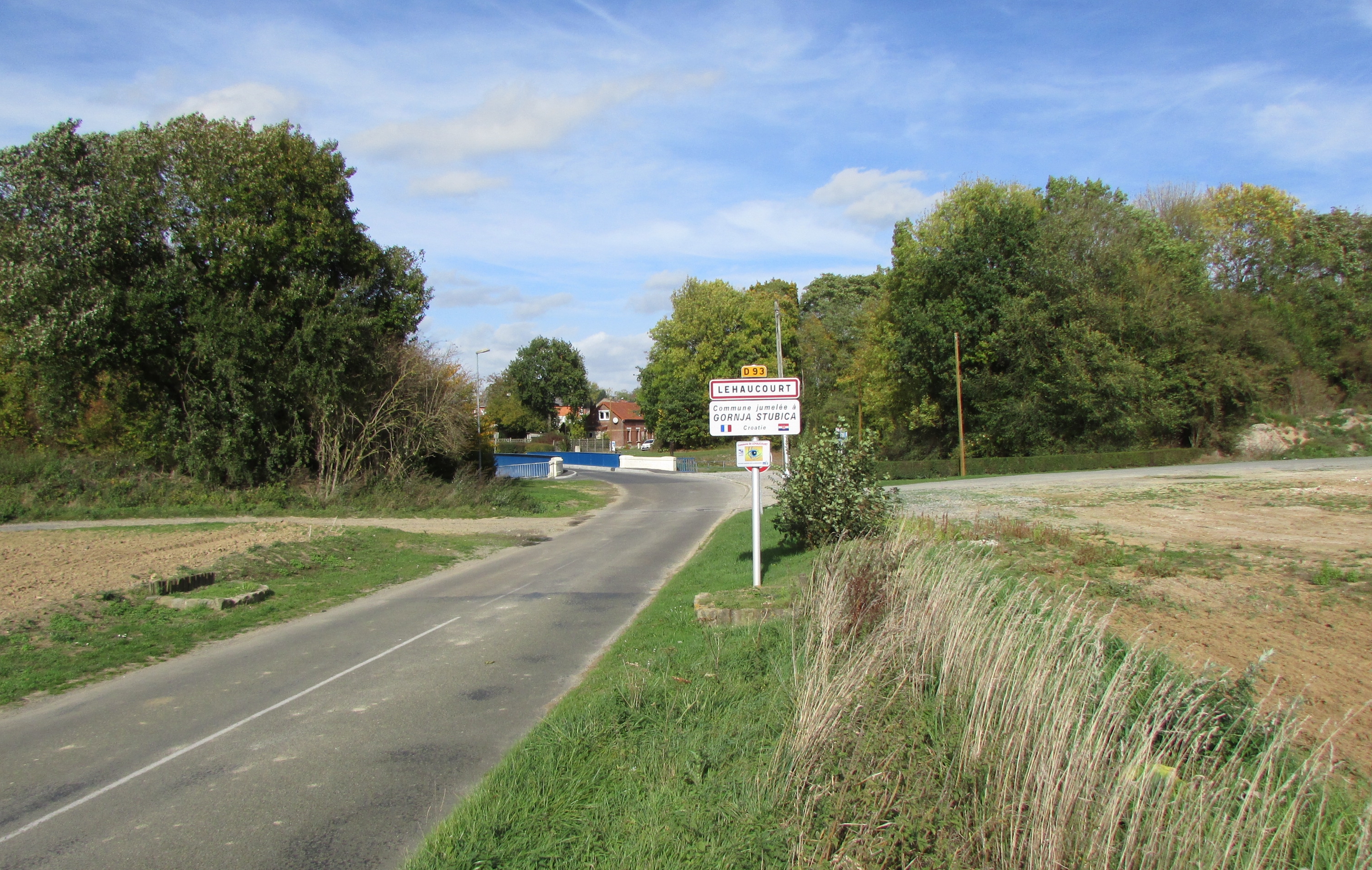 Entrée du village.